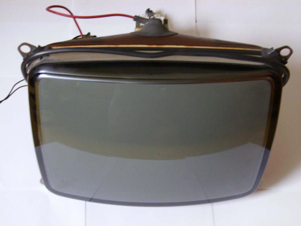 Photo d'un tube cathodique Philips de 14pouces, fabriqué en Espagne. Photo personnelle.